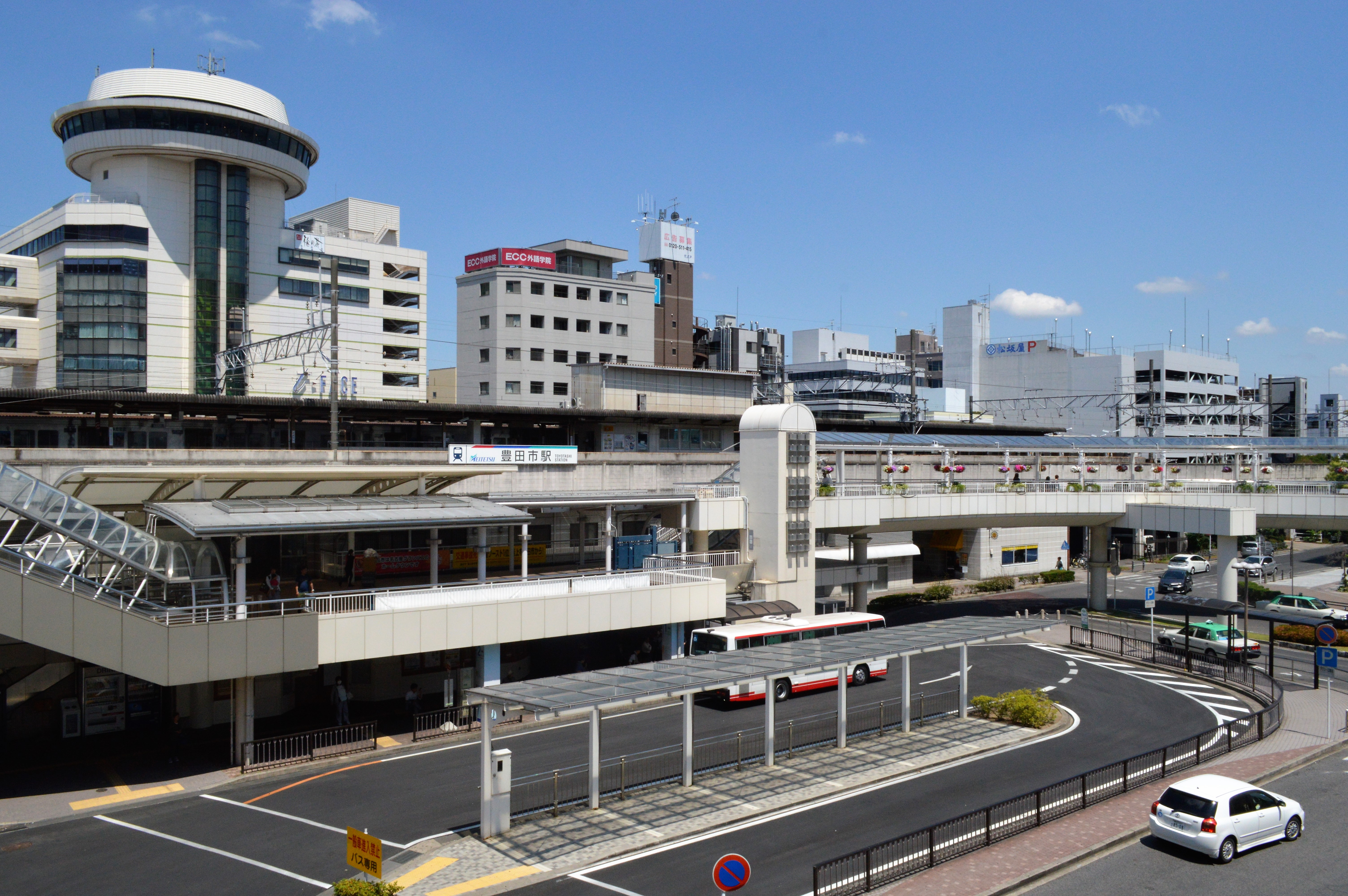 愛知県豊田市にある名鉄豊田市駅。